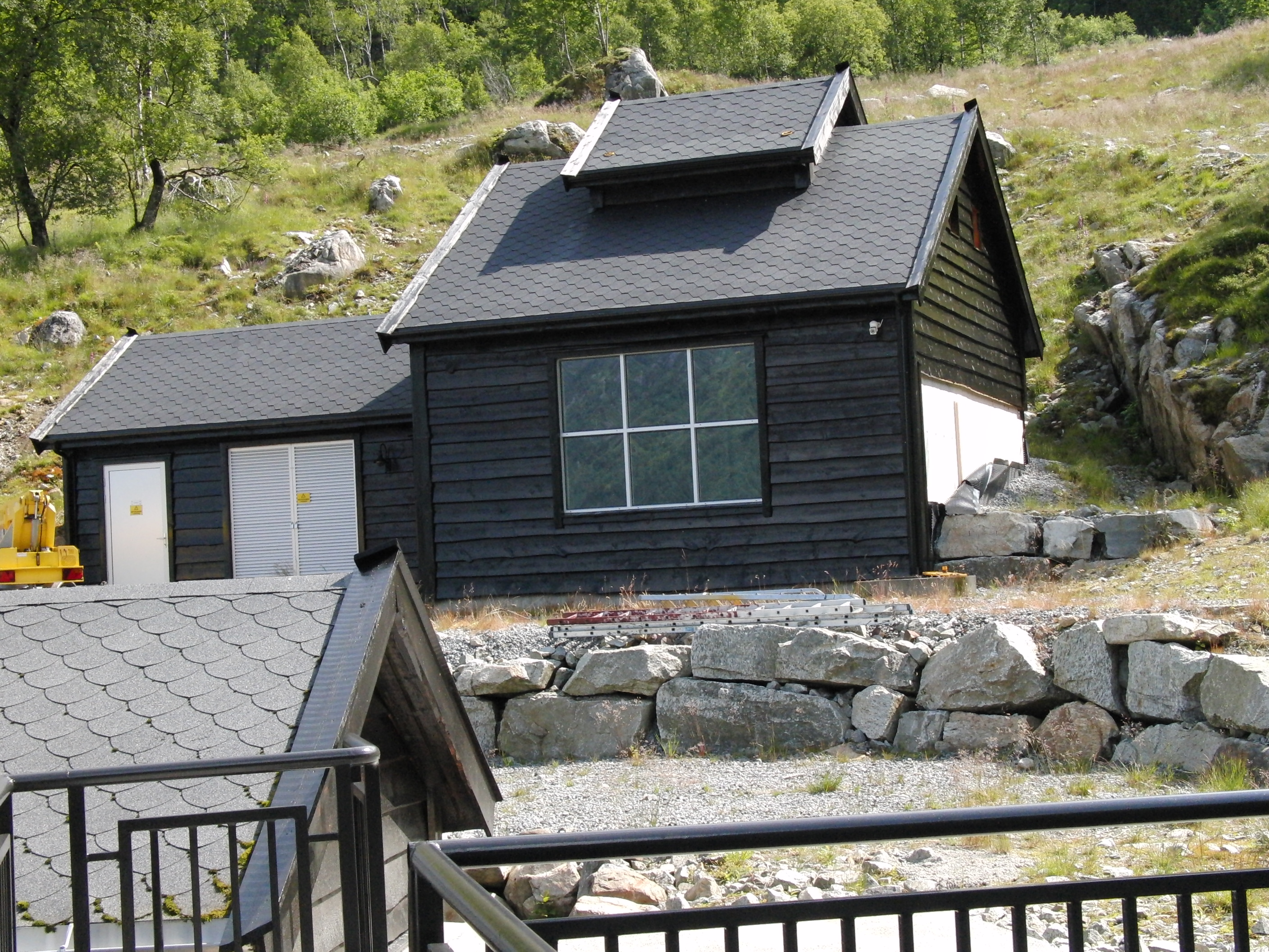 Kløvkraft kraftverk